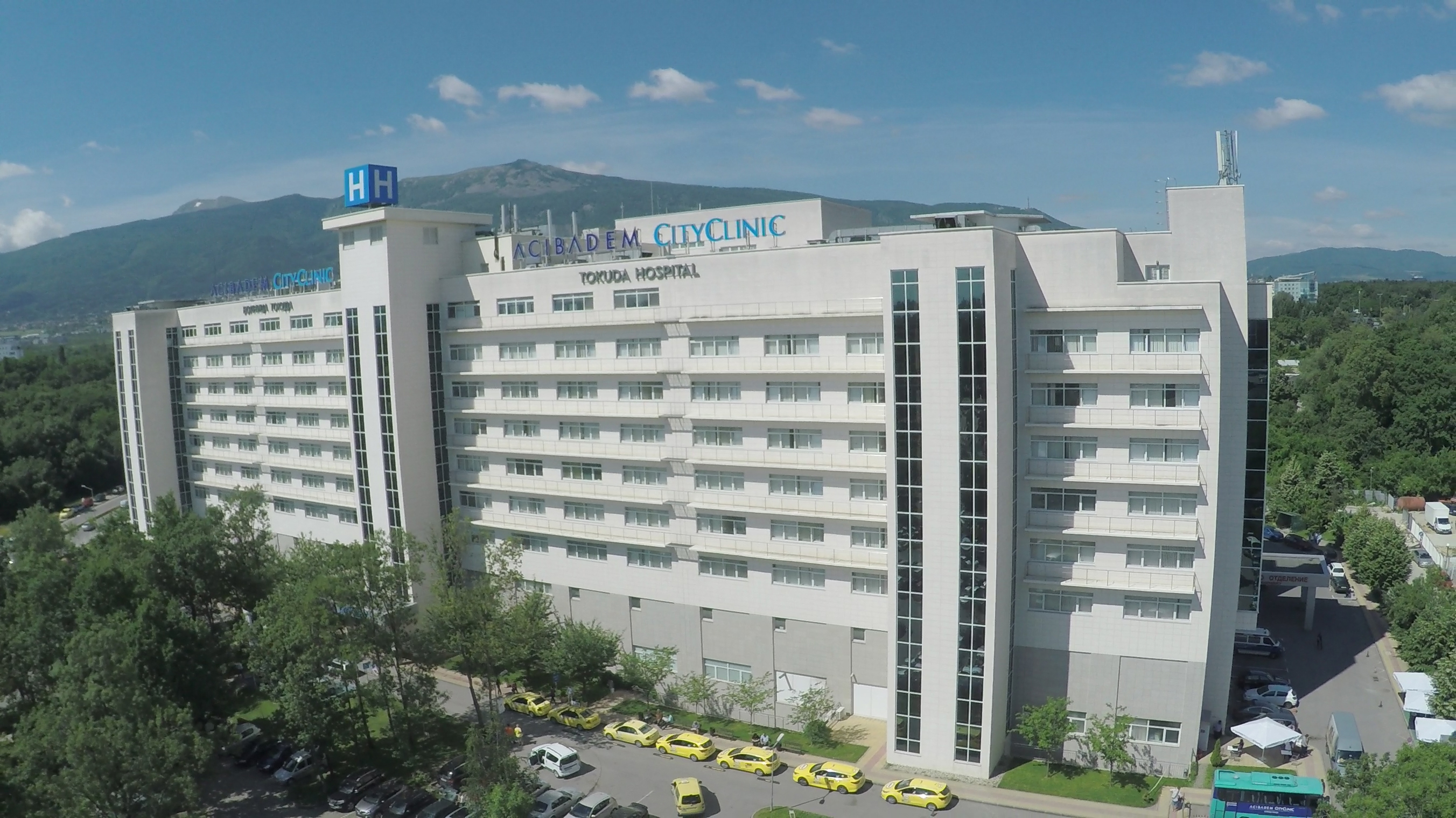 Аджибадем Сити Клиник Болница Токуда, снимана отвън